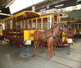 Núcleo1